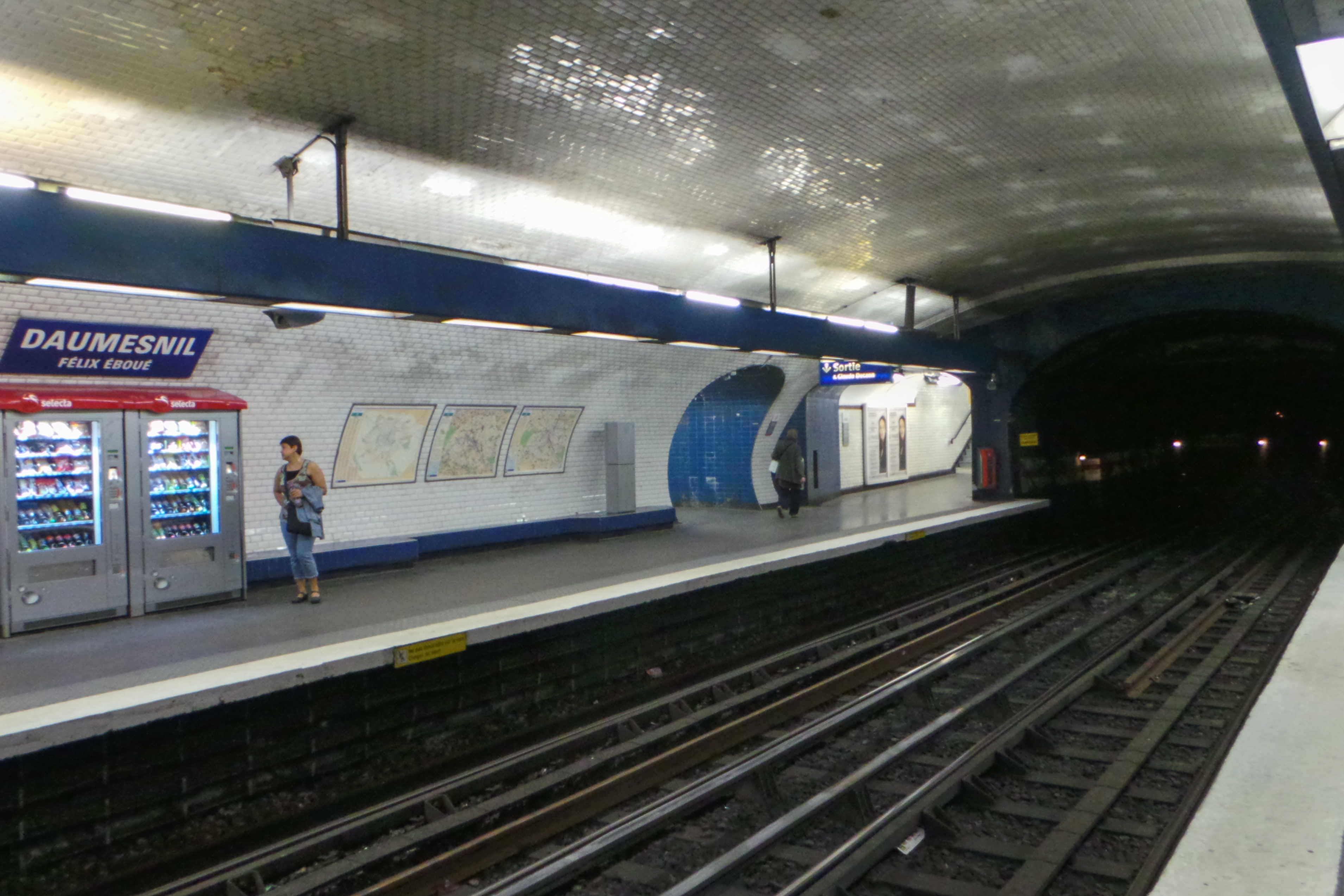 Station de métro Daumesnil, ligne 8 du métro de Paris - Paris, France